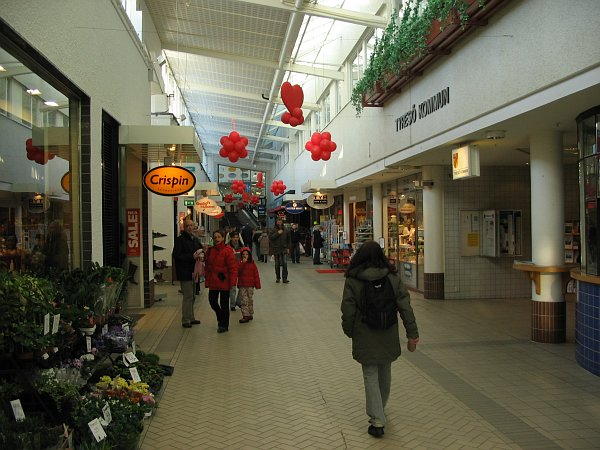 Foto: Bengt B